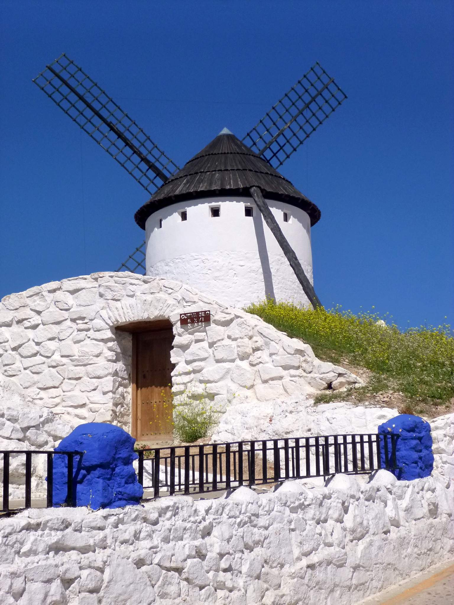 Barrio del Albaicín, Campo de Criptana (Ciudad Real)